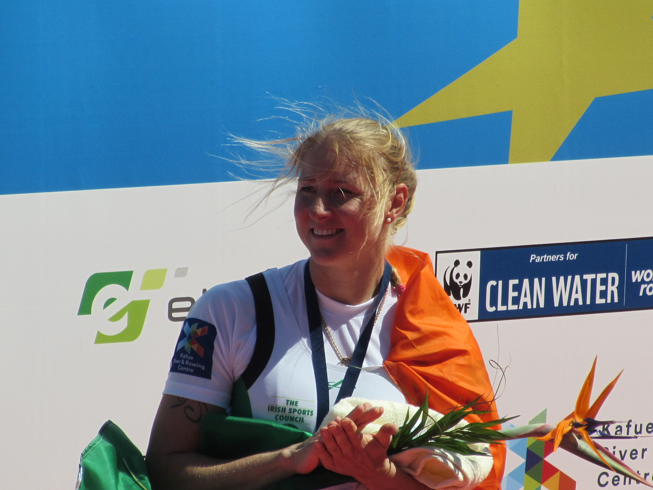 Sanita Puspure, Ruder-EM 2016